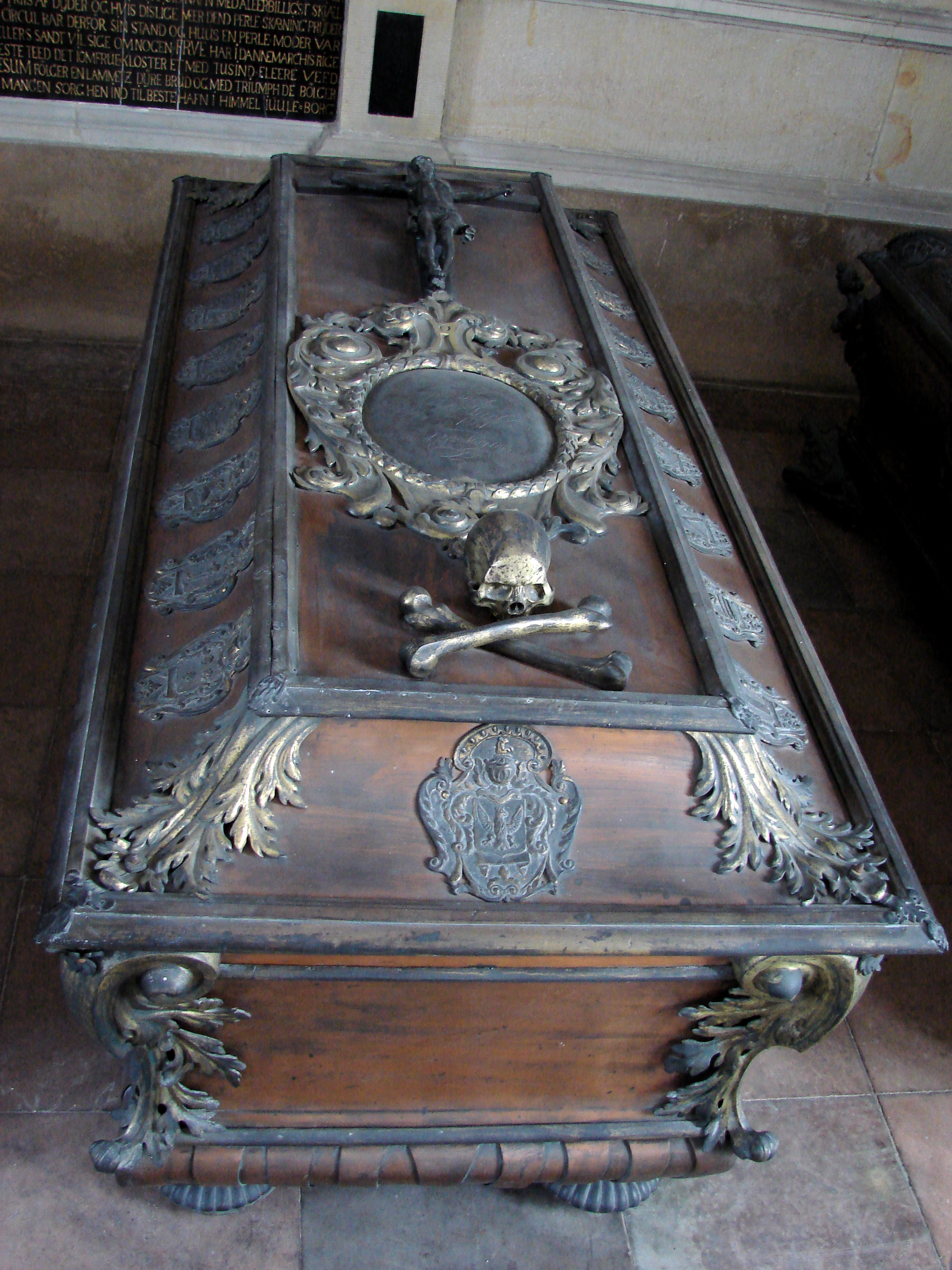 Margrethe Ulfeldts (1641-1703) grav i Holmens Kirkes store gravkapel, København